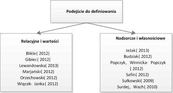 Dwa nurty klasyfikacji pojęcia przedsiębiorstwa rodzinnego opracowano na podstawie badań eksperckich realizowanych w latach 2012-2013 przez Ewę Więcek-Jankę (Katedra Marketingu i Sterowania Ekonomicznego, Politechnika Poznańska)